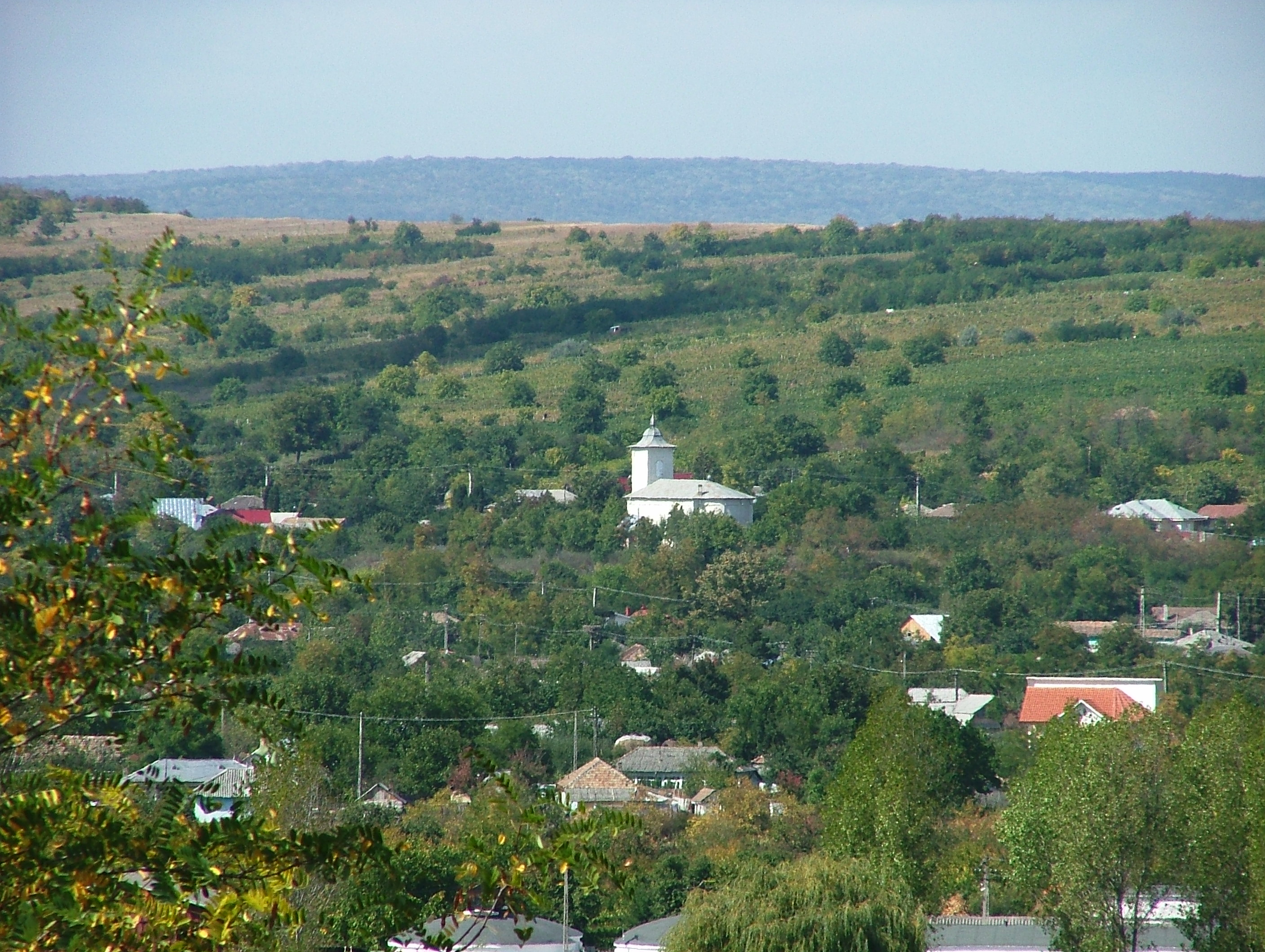 Biserica "Sf. Nicolae"